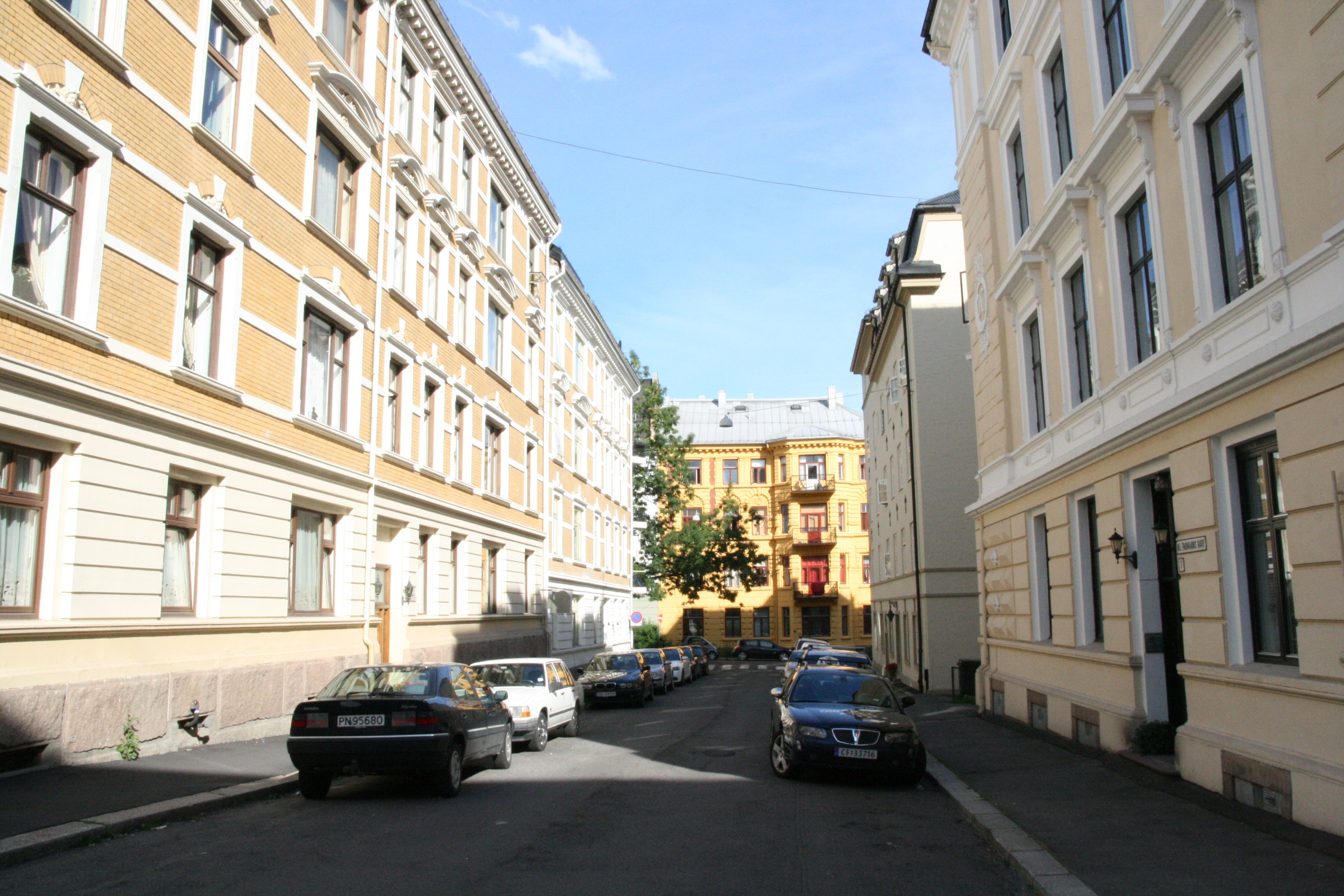 Eivind Astrups gate, sett fra Bjørn Farmanns gate. Skillebekk i Oslo.